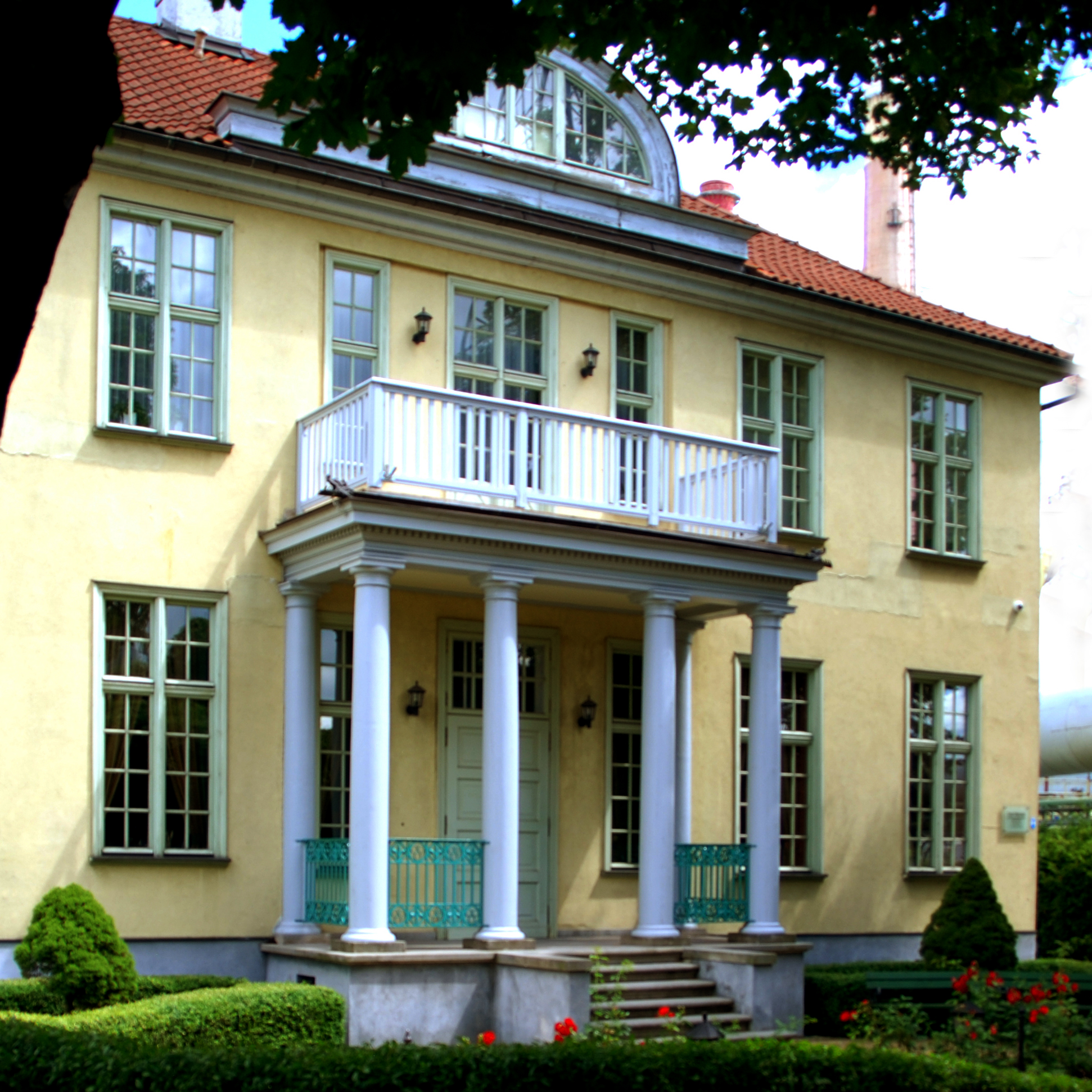 Dwór Młyniska, ul. Swojska 13. Widok dworu po adaptacji dla Zespołu Elektrociepłowni Gdańsk, stan 1990